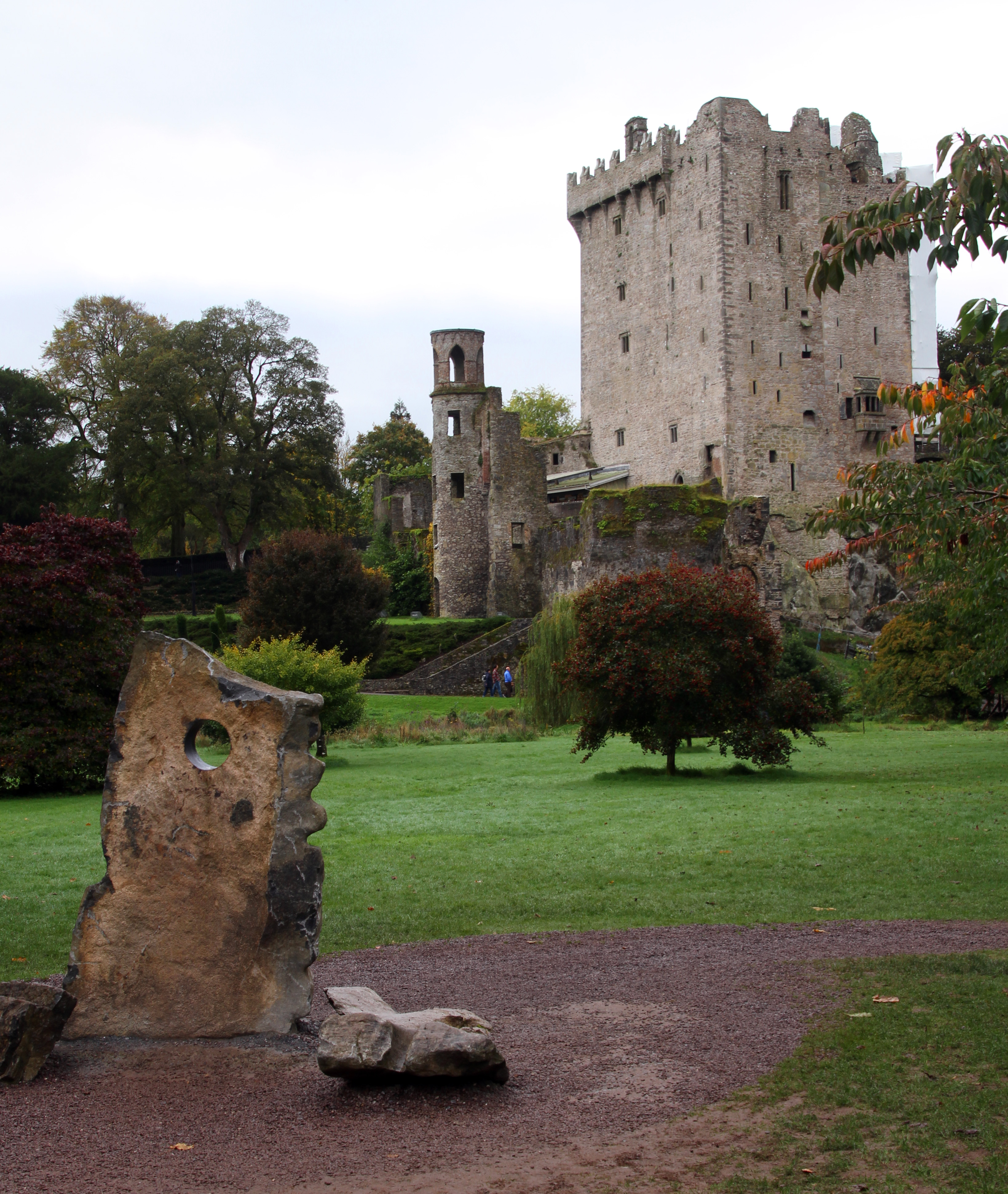 Blarney Castle